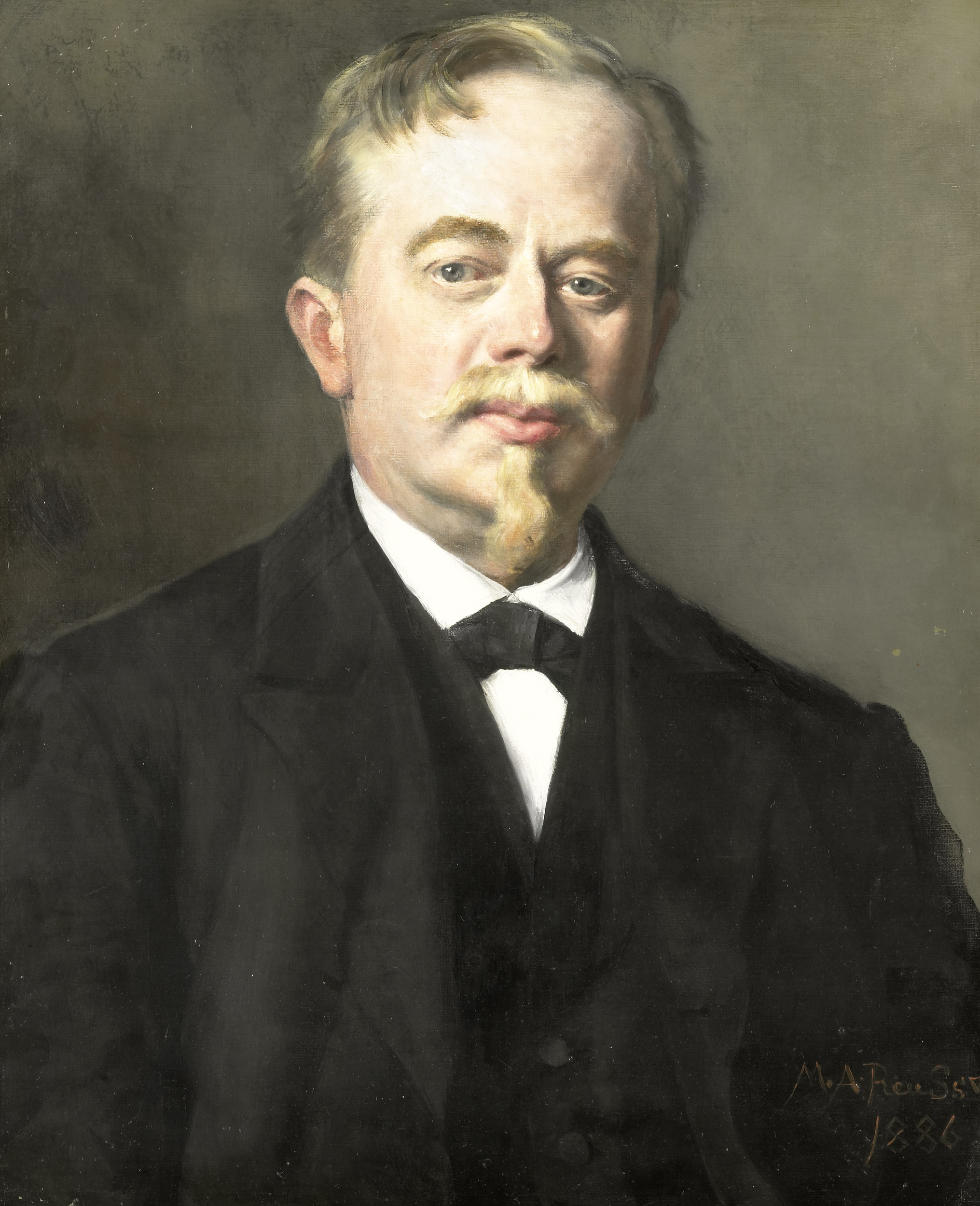 Portret van Augustus Allebé (1838-1927), schilder en directeur van de Rijksacademie van Beeldende Kunsten te Amsterdam. Buste en face.